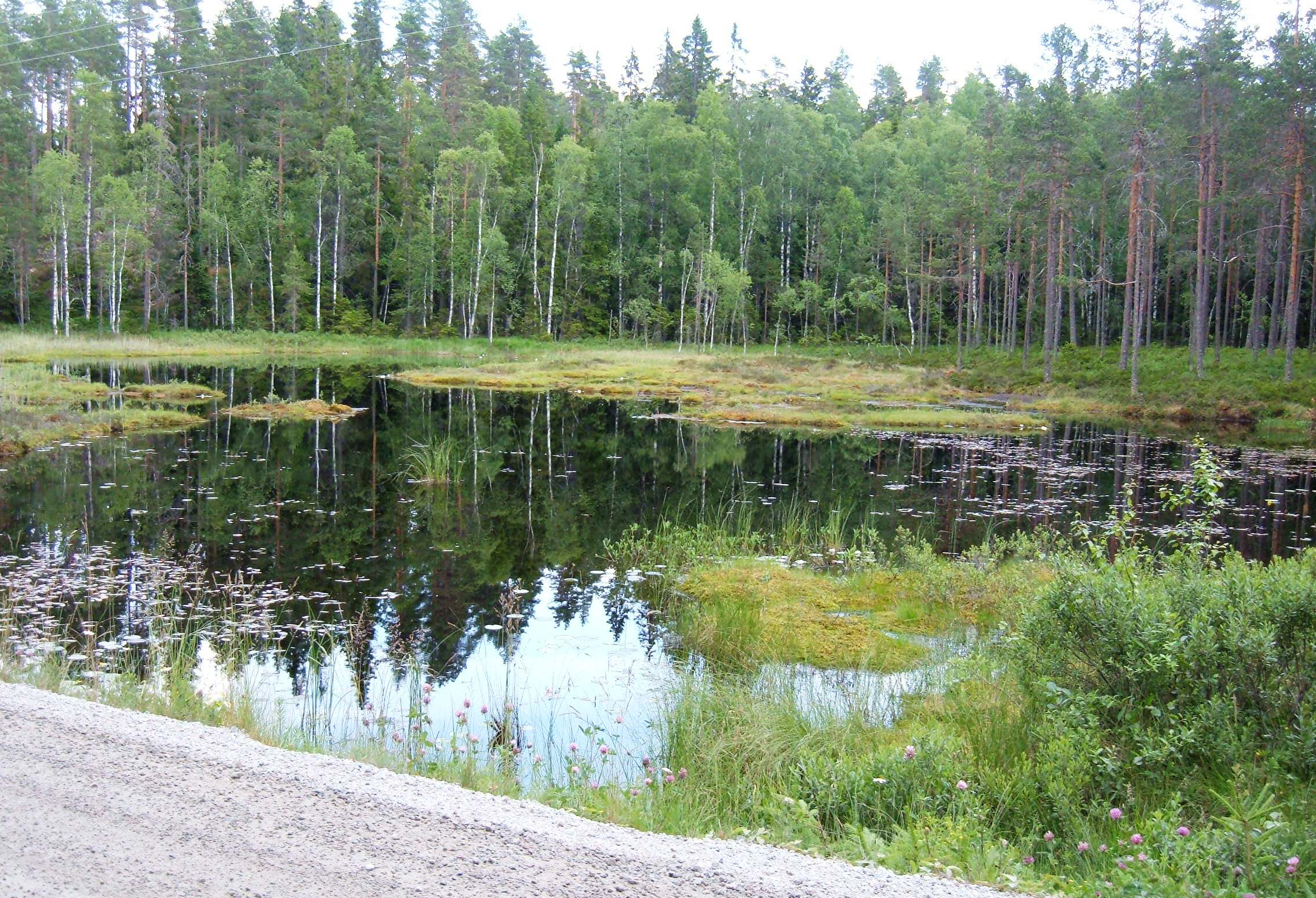 Kjøltjern ved Søndre Mangen vei i Aurskog-Høland kommune.